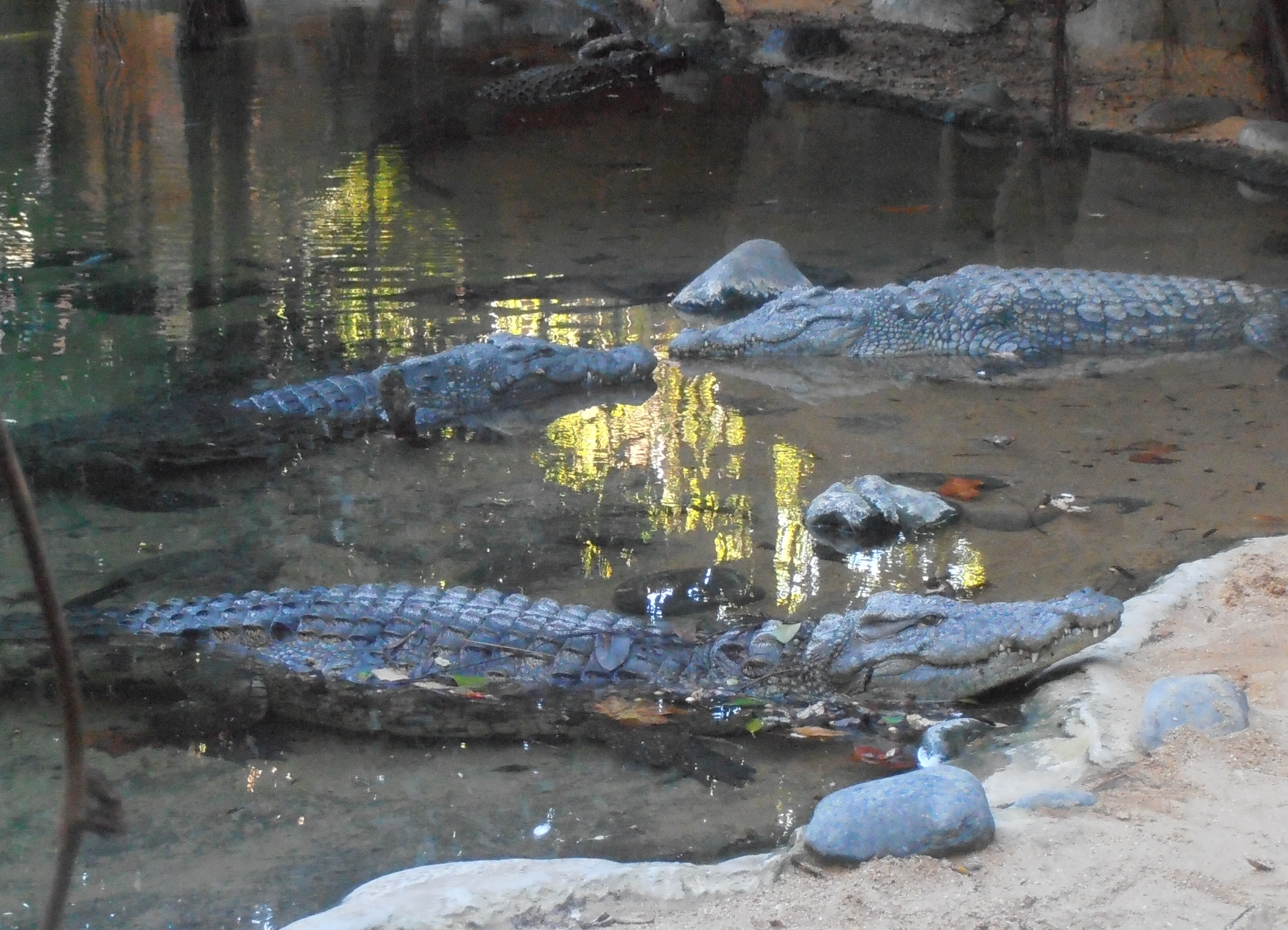 Coccodrillo del Nilo (Bioparc di Fuengirola)